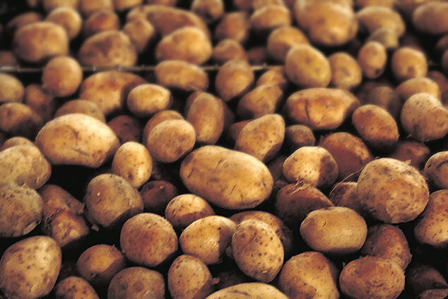 Potatoes.